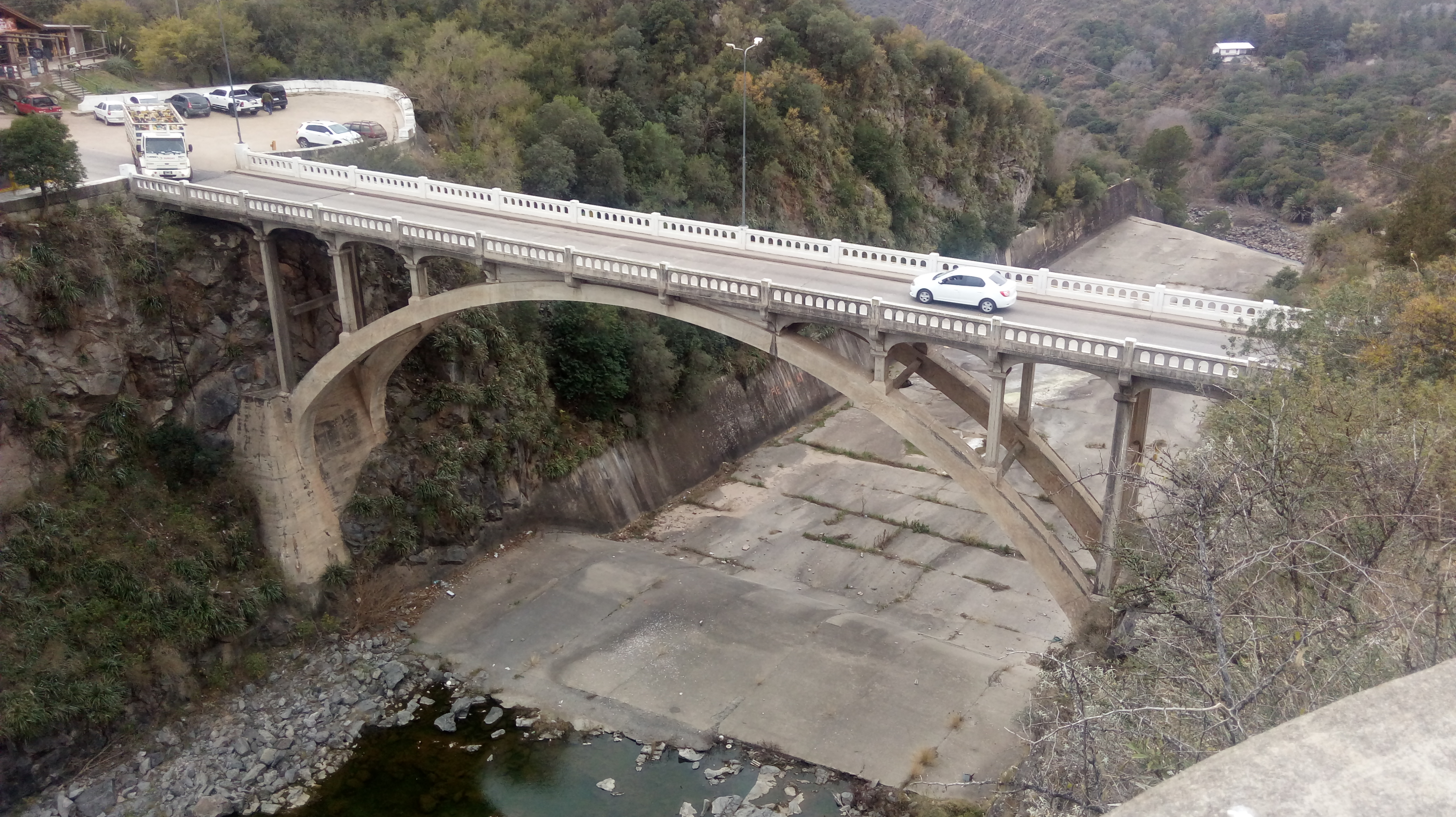 Puente de la RP 5 sobre el vertedero del embalse Ministro Pistarini